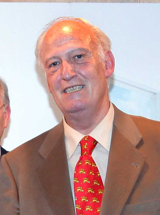 Jornadas Económicas Abiertas del PP de Moncloa-Aravaca